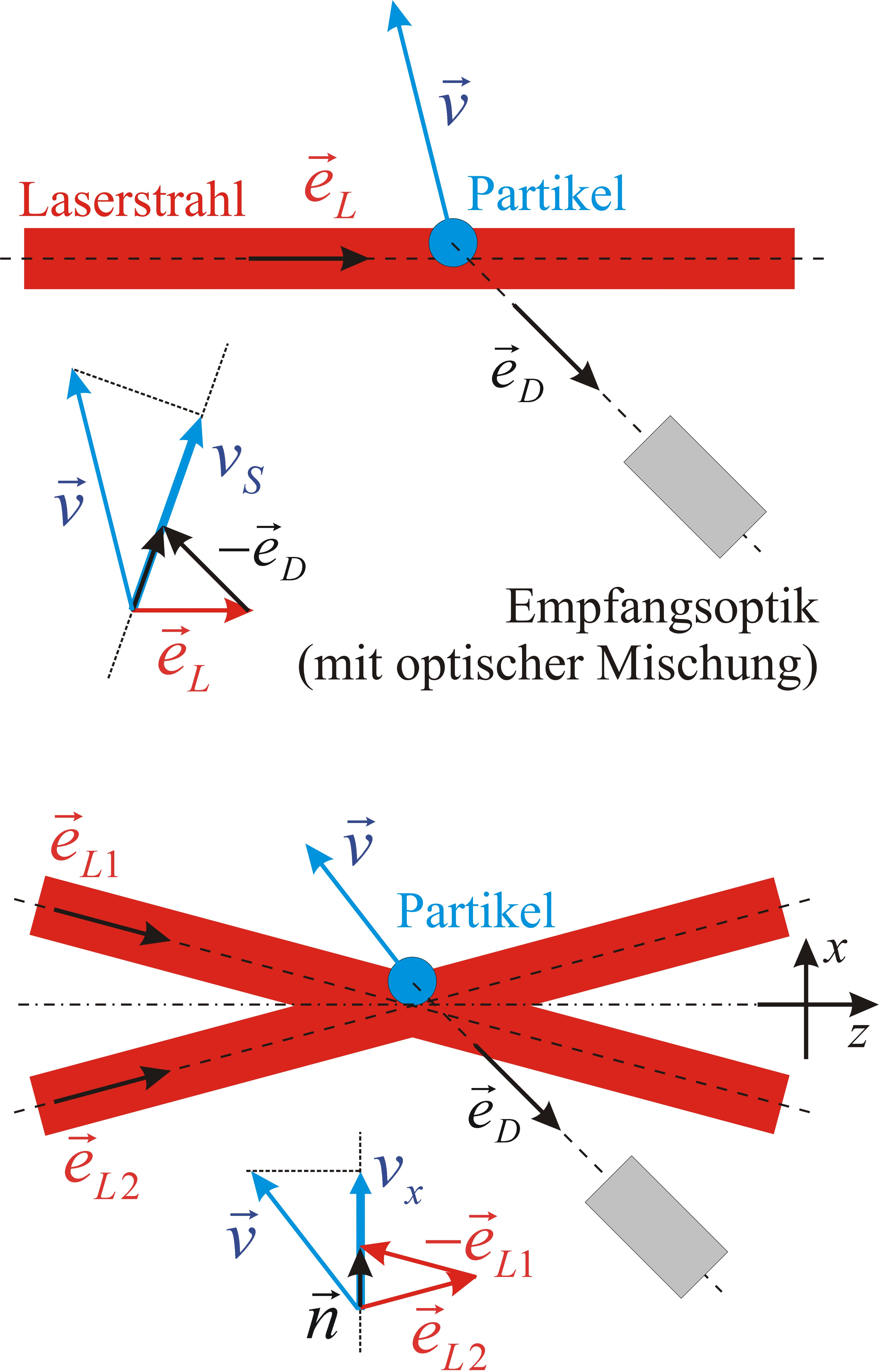 Doppler Effekt bei der Laser Doppler Technik